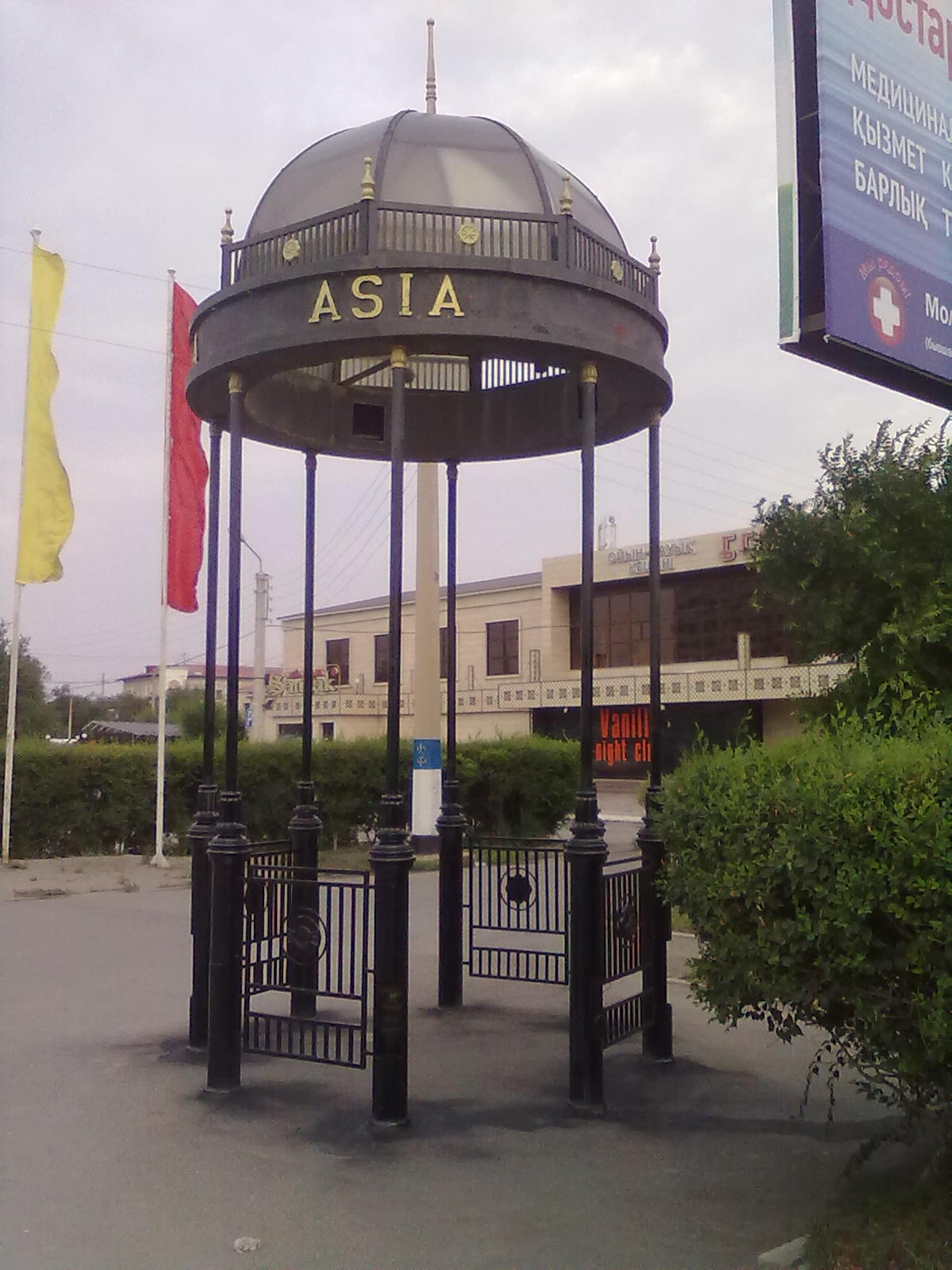 Il monumento indicante la riva asiatica del fiume Ural ad Atyrau, Kazakistan. The monument on the asian bank of the Ural river in Atyrau, Kazakhstan.